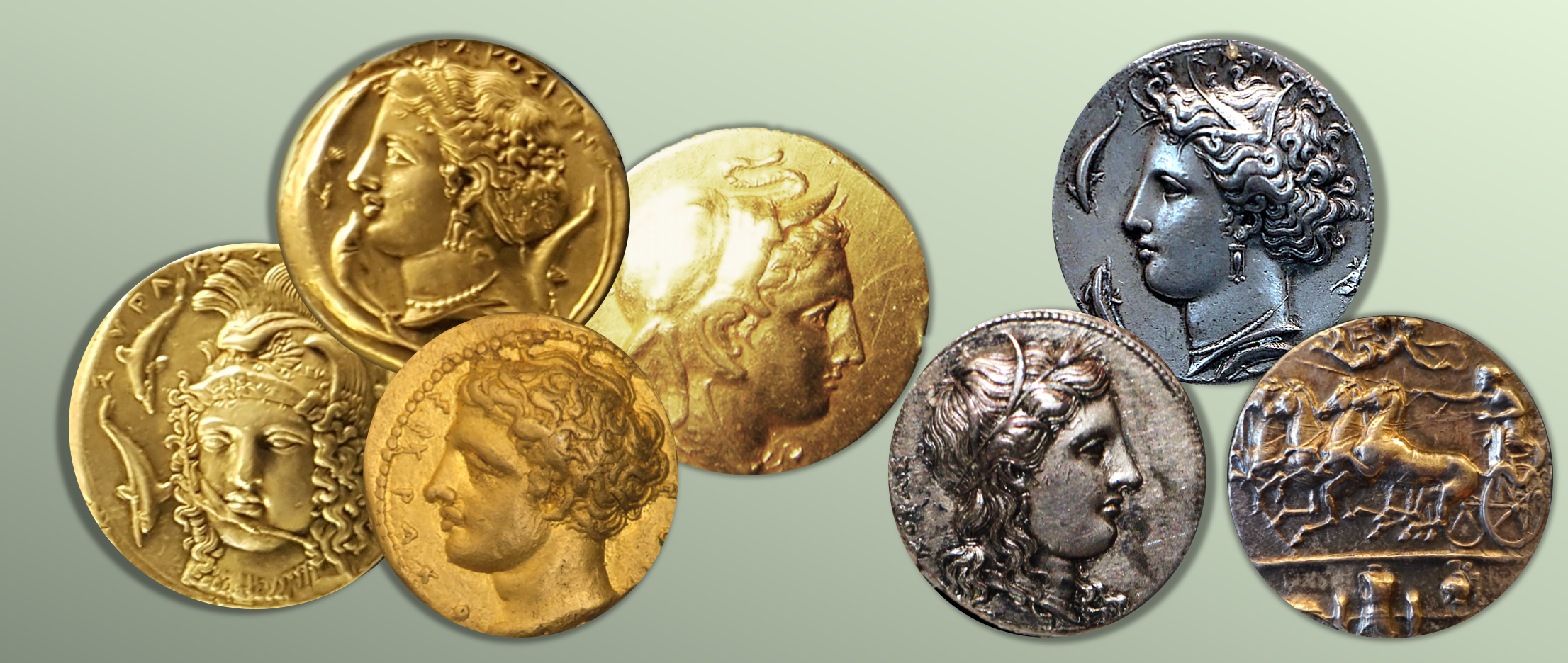 Collage di monete siracusane di epoca greca (Syrakoussai). Rispettive immagini tutte già presenti su commons in category: Coins of Syracuse